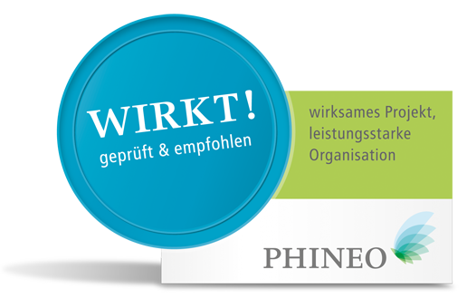 PHINEO Wirkt-Siegel